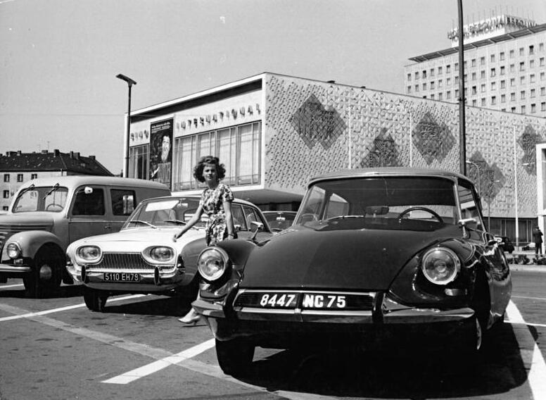 Zentralbild Spremberg 8.8.1964 Berlin - begehrtes Ziel für Touristen aus aller Welt Weit über über 100.000 Touristen reisten seit Jahresbeginn in die Hauptstadt der DDR. Etwa 38.000 Besucher kamen davon bis jetzt aus dem Ausland an die Spree. Fahrzeuge mit ausländischen Kennzeichen -wie hier in der Karl-Marx-Allee vor dem Kino International - fotografierende und filmende Touristen gehören zum alltäglichen Bild der Stadt.